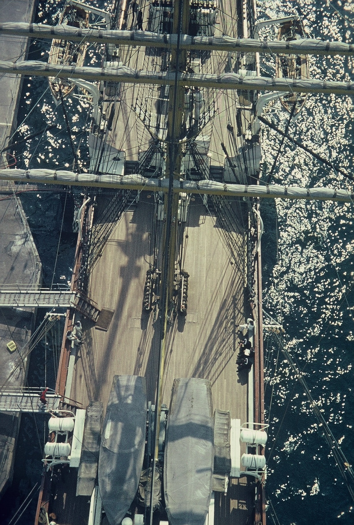 Oberdeck der Gorch Fock (1958), von der Spitze des Vortopps fotografiert; an der Blücherbrücke in Kiel